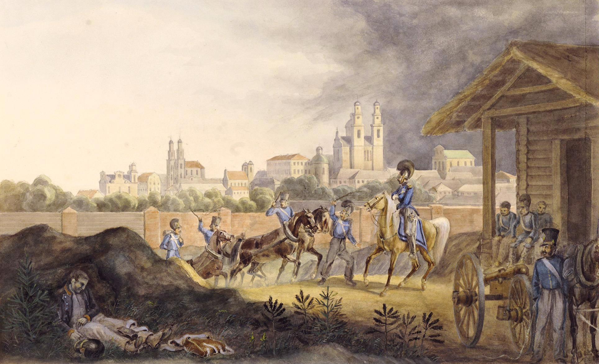 Беларуская (тарашкевіца): Полацак (Połacak). Панарама места, 25 ліпеня 1812